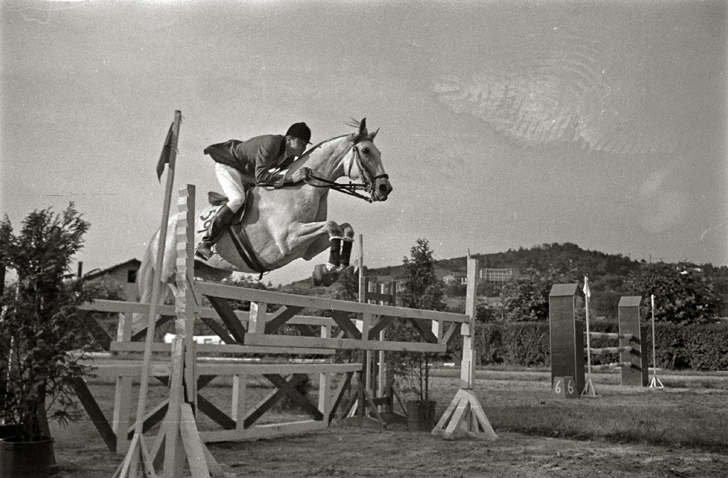 Título original: Competición hípica en Loiola (2/2) Localización: San Sebastián (Guipúzcoa)